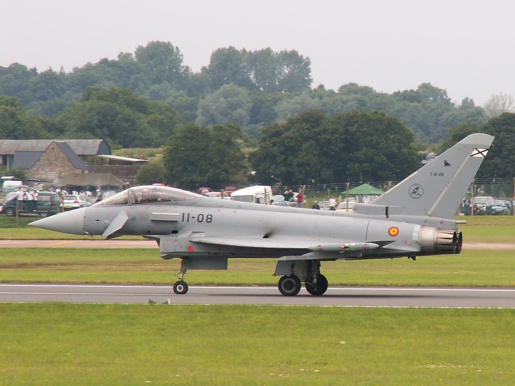 Un Eurofighter Typhoon del Ejército del Aire de España en el Royal International Air Tattoo 2007, Gloucestershire, Inglaterra. (Imagen recortada)